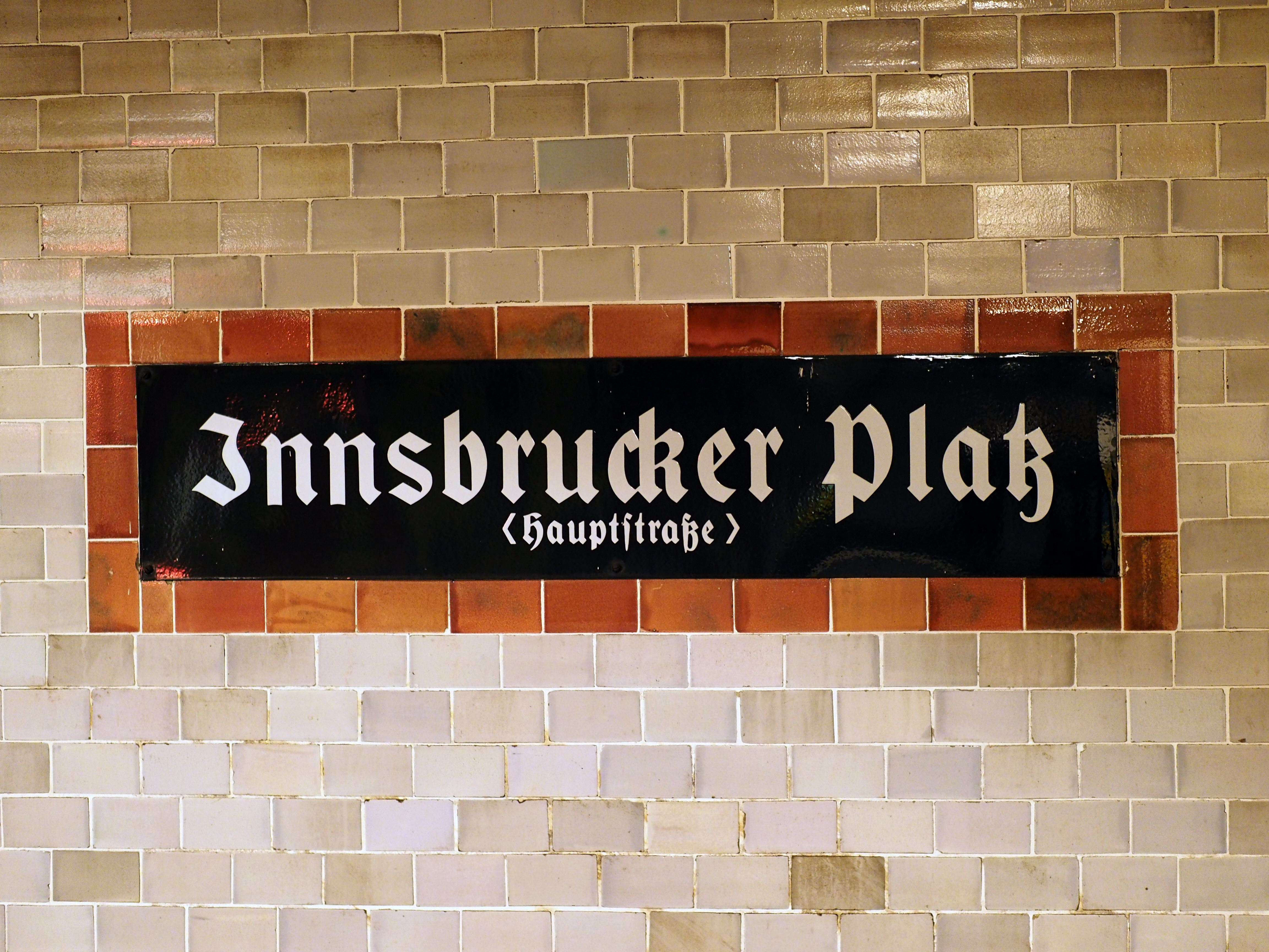 Innsbrucker Platz, U-Bahnhof, Namensschild und Wandfliesen